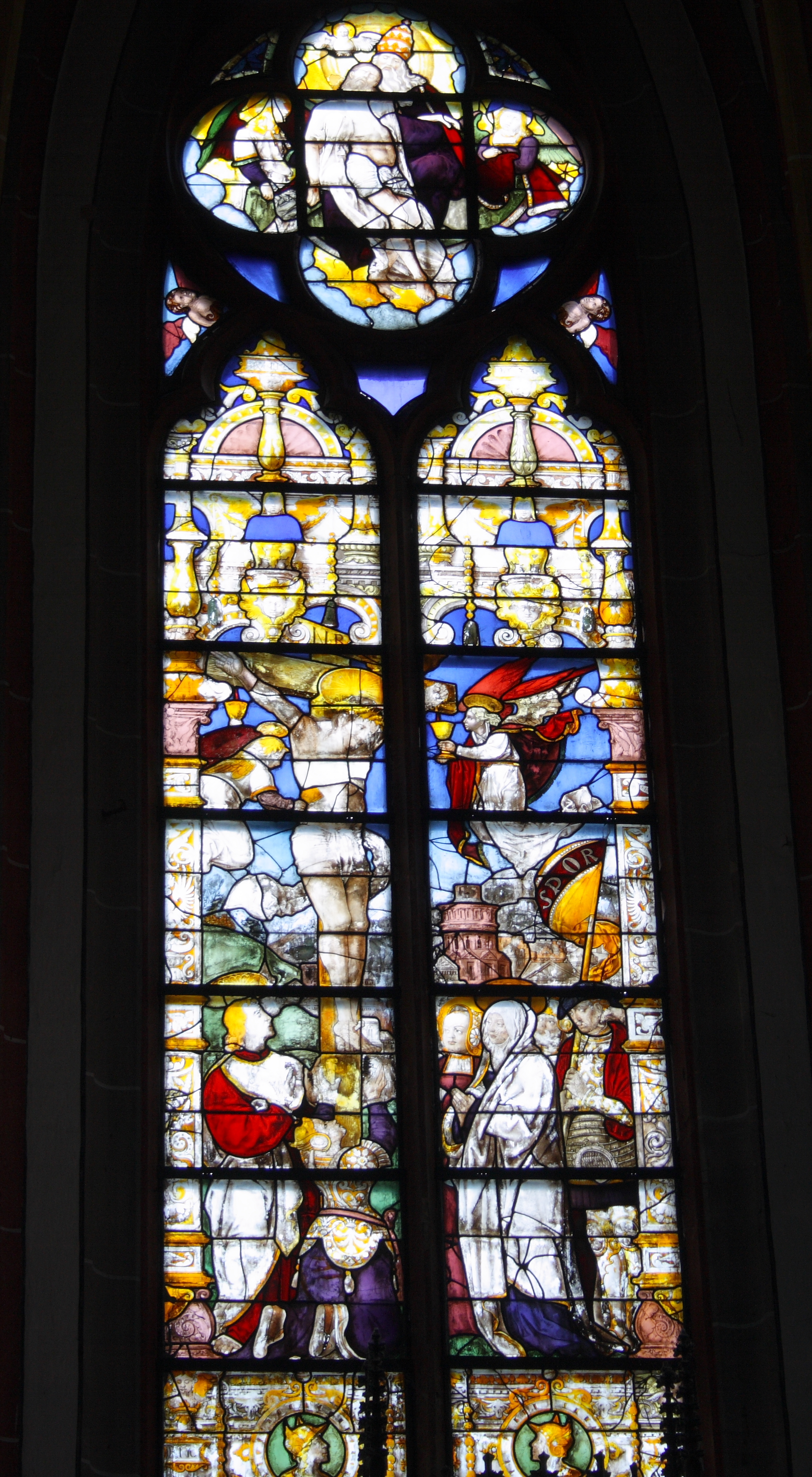 Katholische Pfarrkirche, ehemalige Stiftskirche Unsere Liebe Frau (Mariä Himmelfahrt) in Kyllburg im Eifelkreis Bitburg-Prüm (Rheinland-Pfalz), mittleres Bleiglasfenster im Chor, von 1533/34; Darstellung: Kreuzigung Christi; im Vierpass: Gnadenstuhl